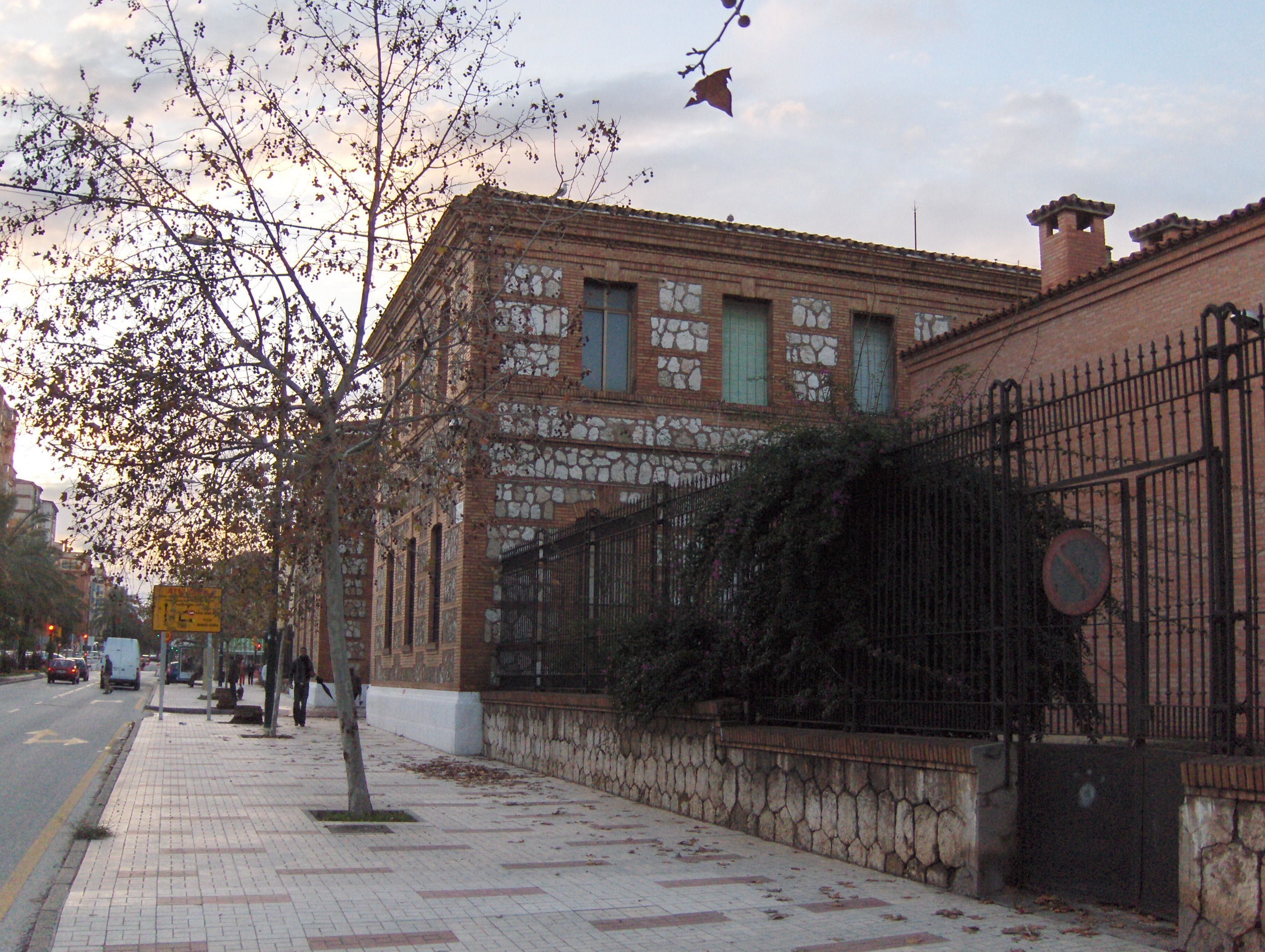 Antigua prisión provincial de Málaga, España.